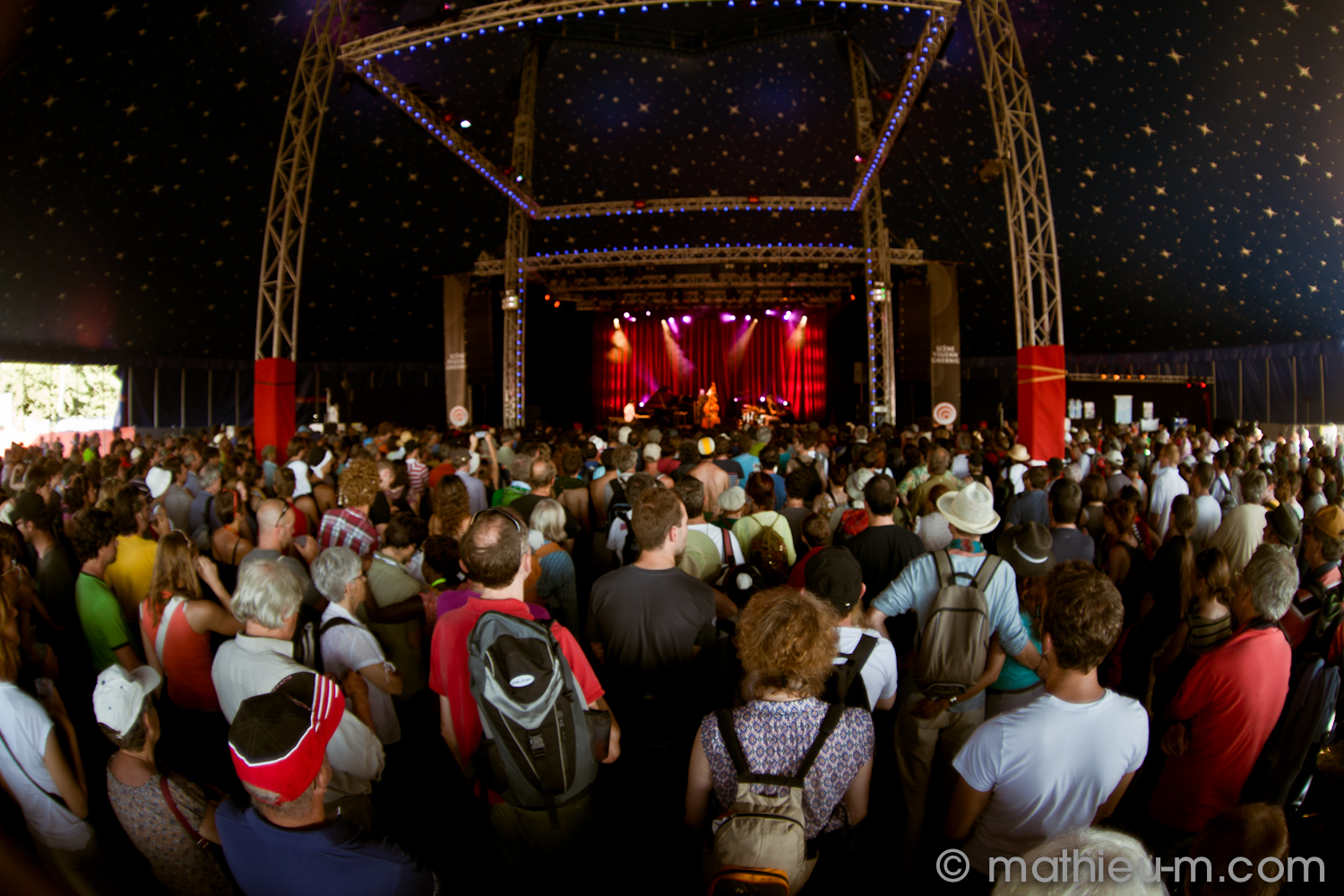 Le Cabaret Breton du Festival des Vieilles Charrues le 22 juillet 2012.